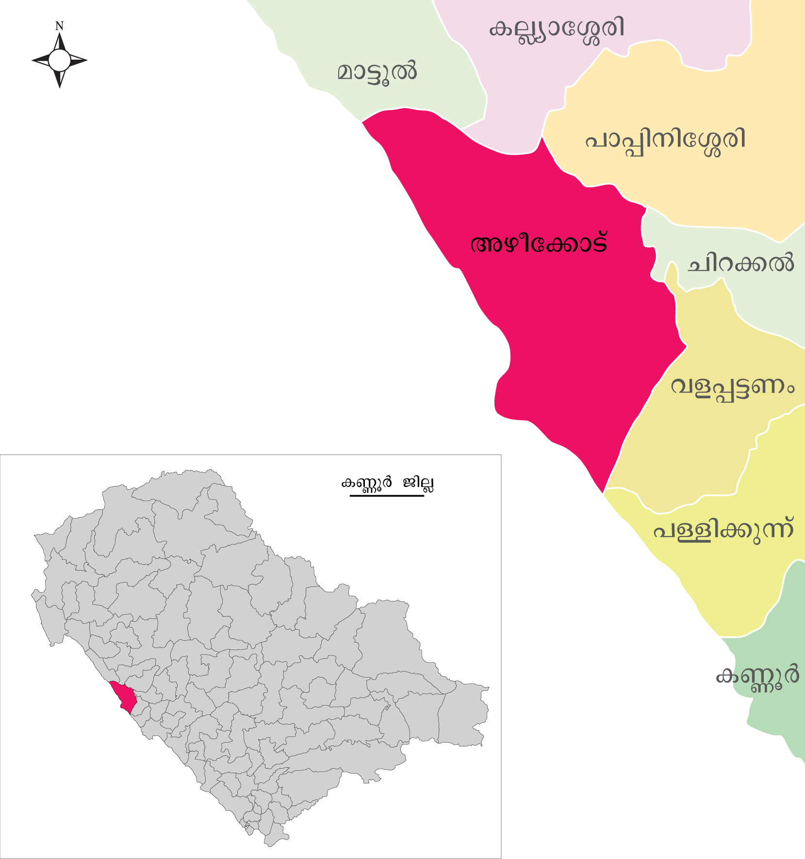 കണ്ണൂർ ജില്ലയിലെ അഴീക്കോട് ഗ്രാമപഞ്ചായത്ത്